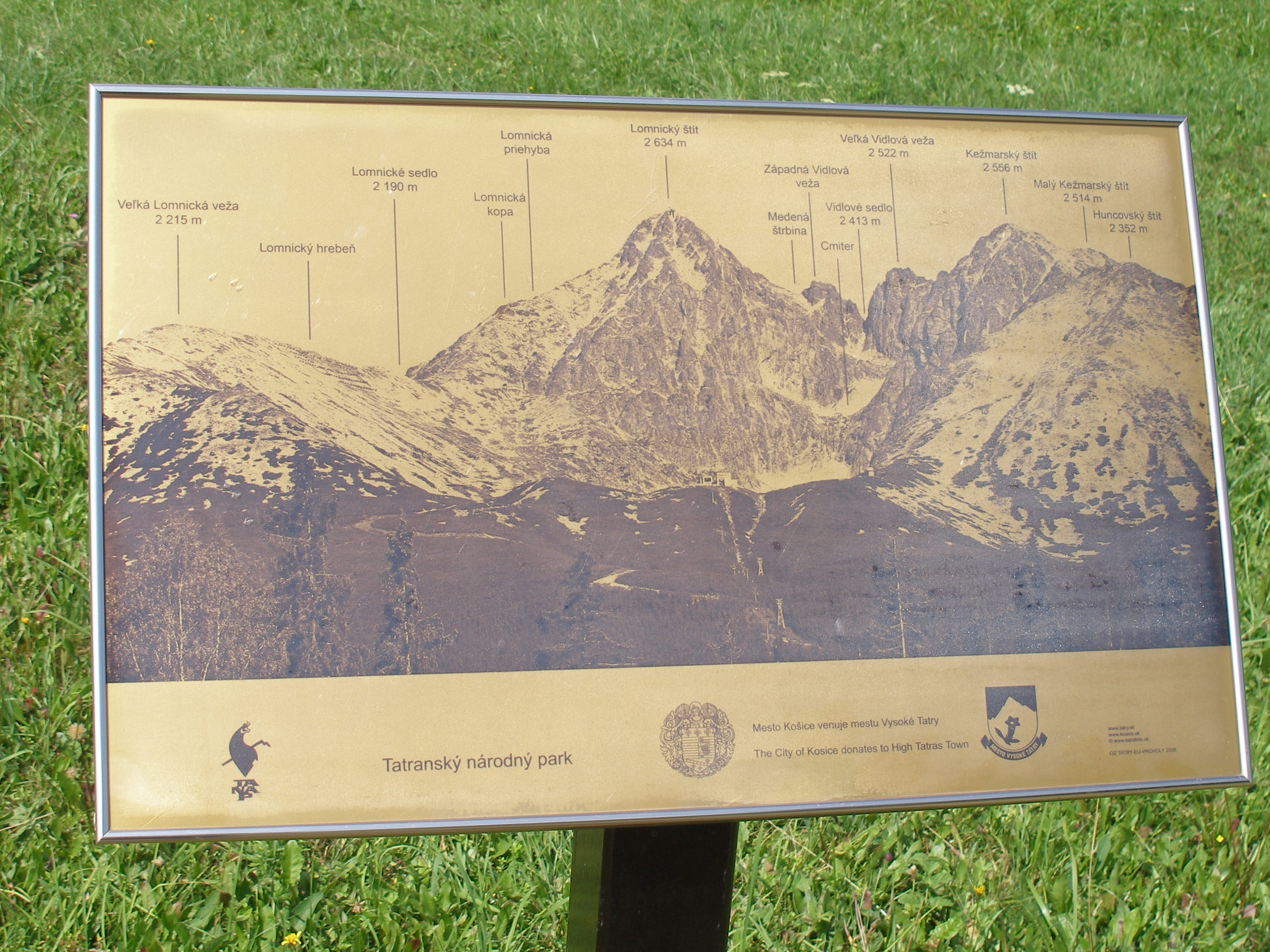 Okolie osady Tatranská Lomnica